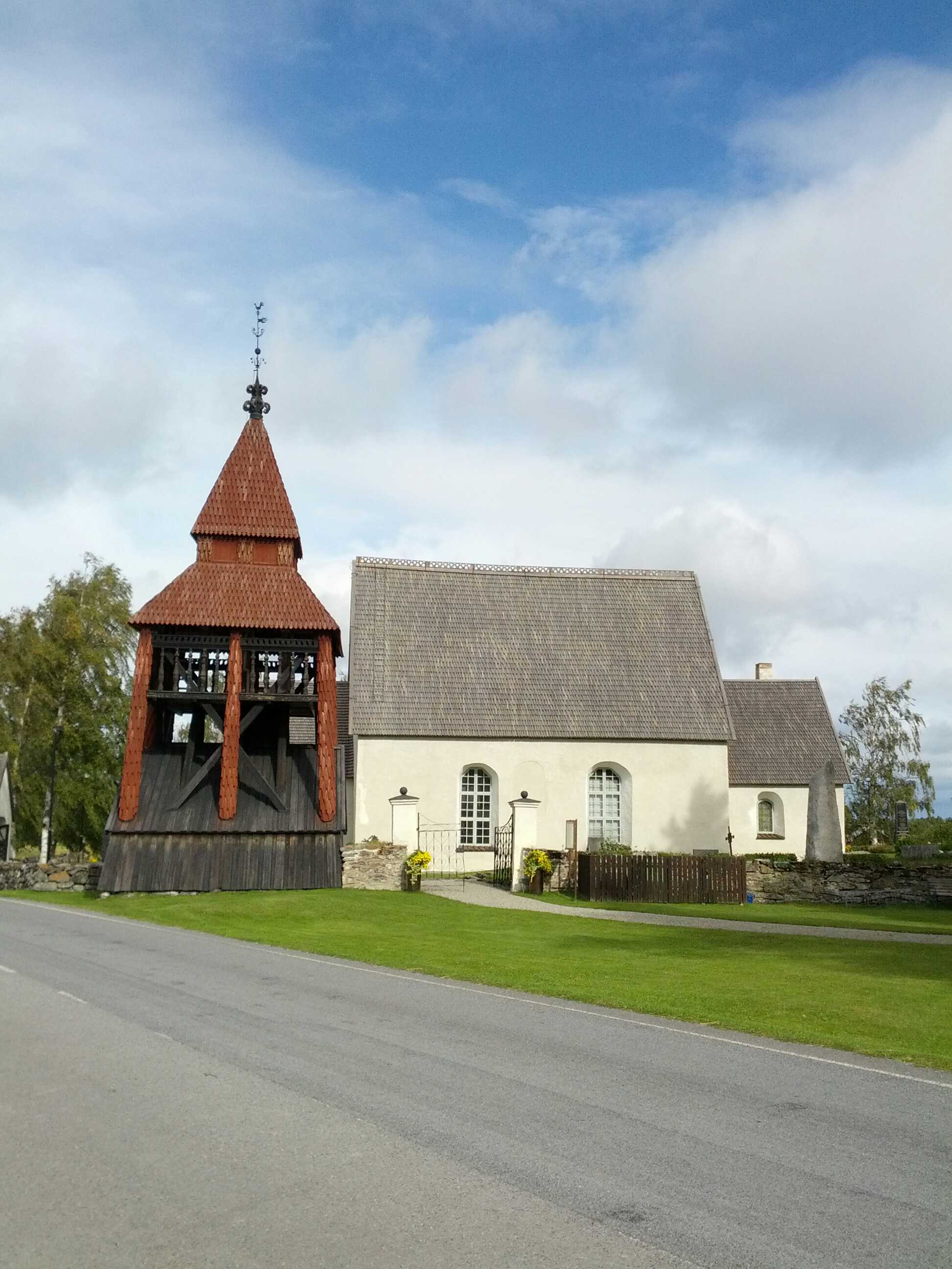 Norderö kyrka (Norderöns prästbord 1:1)